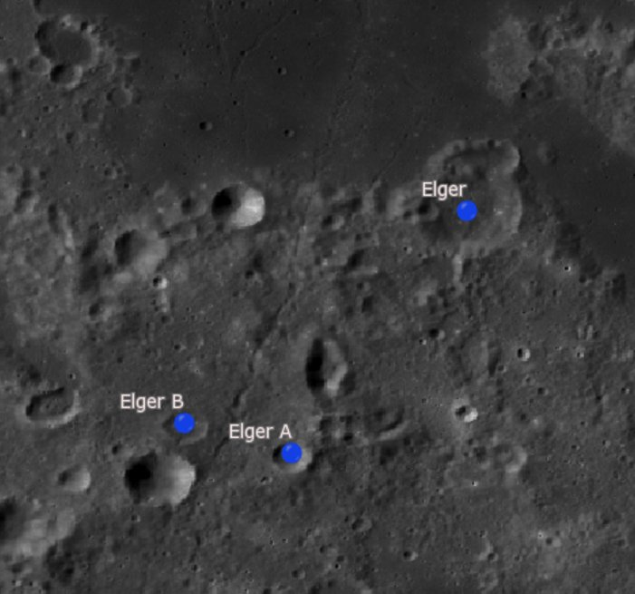 Cráter lunar Elger. Cráteres satélite. (Imagen LROC)